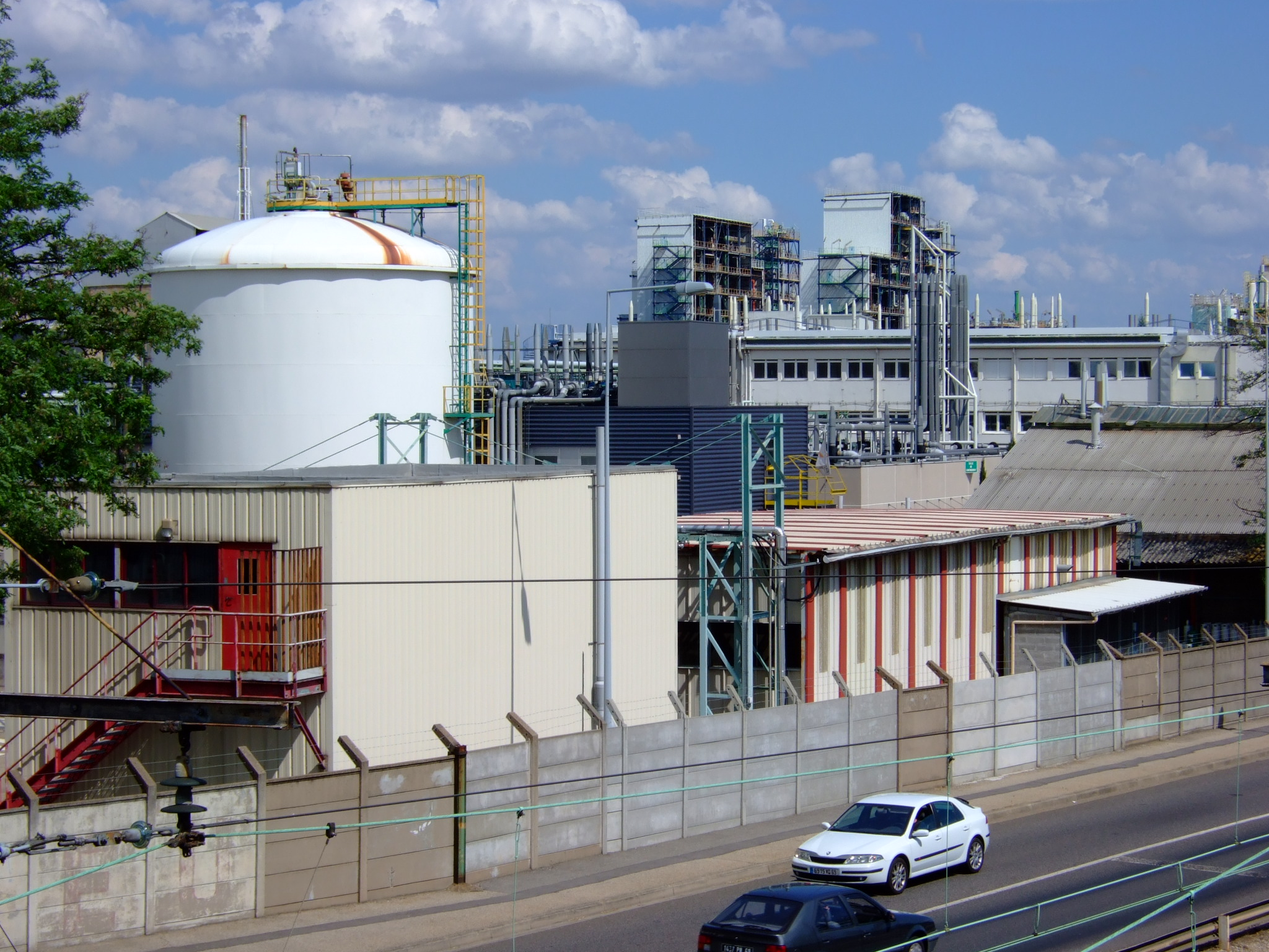 L'usine Arkema de Pierre-Bénite, à la limite nord de la commune